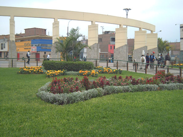 Plaza de Armas de Puente Piedra